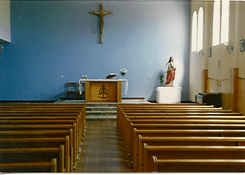 unutašnjost župne crkve u Donjem i Gornjem Crnču